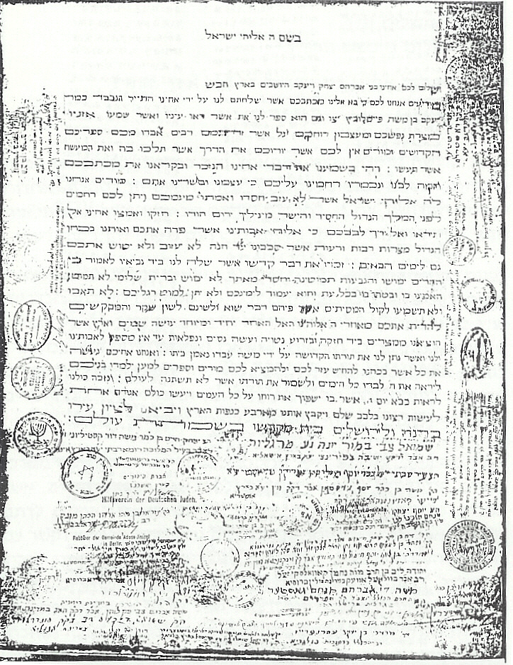 איגרת 43 הרבנים אל יהודי חבש, ה'תרס"ח (1908)